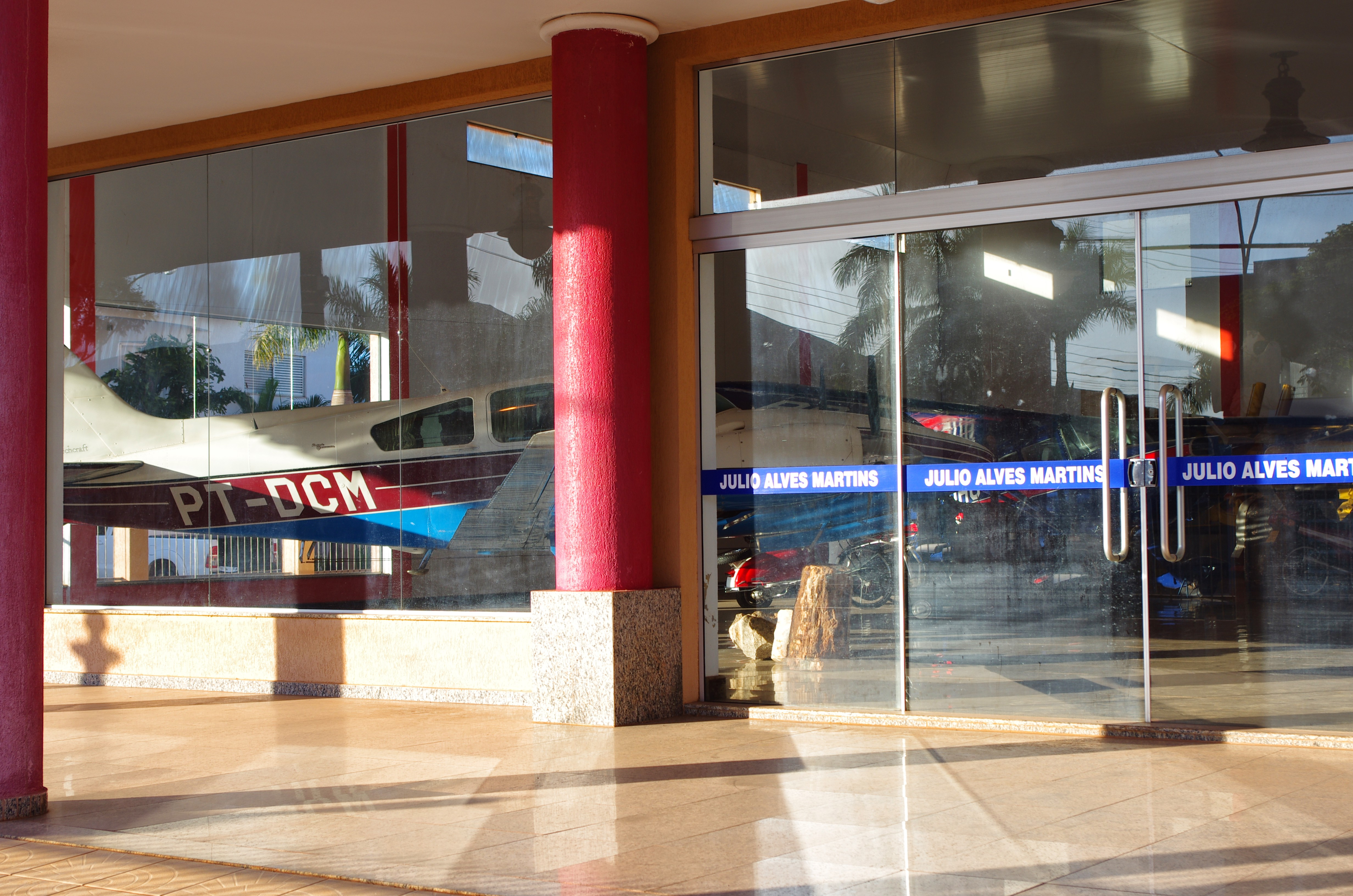 Costa Rica - MS, Brazil